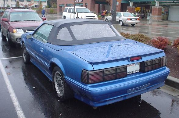 circa. 1987 model year ASC McLaren Mustang spider